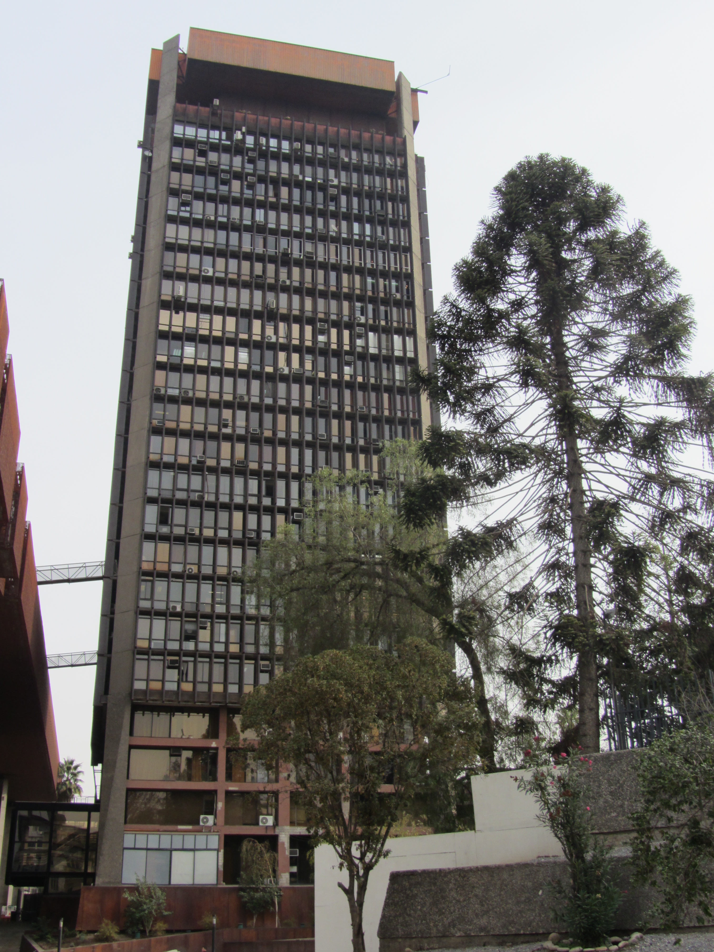 Edificio Diego Portales, cuando aún pertenecía al Ministerio de Defensa de Chile